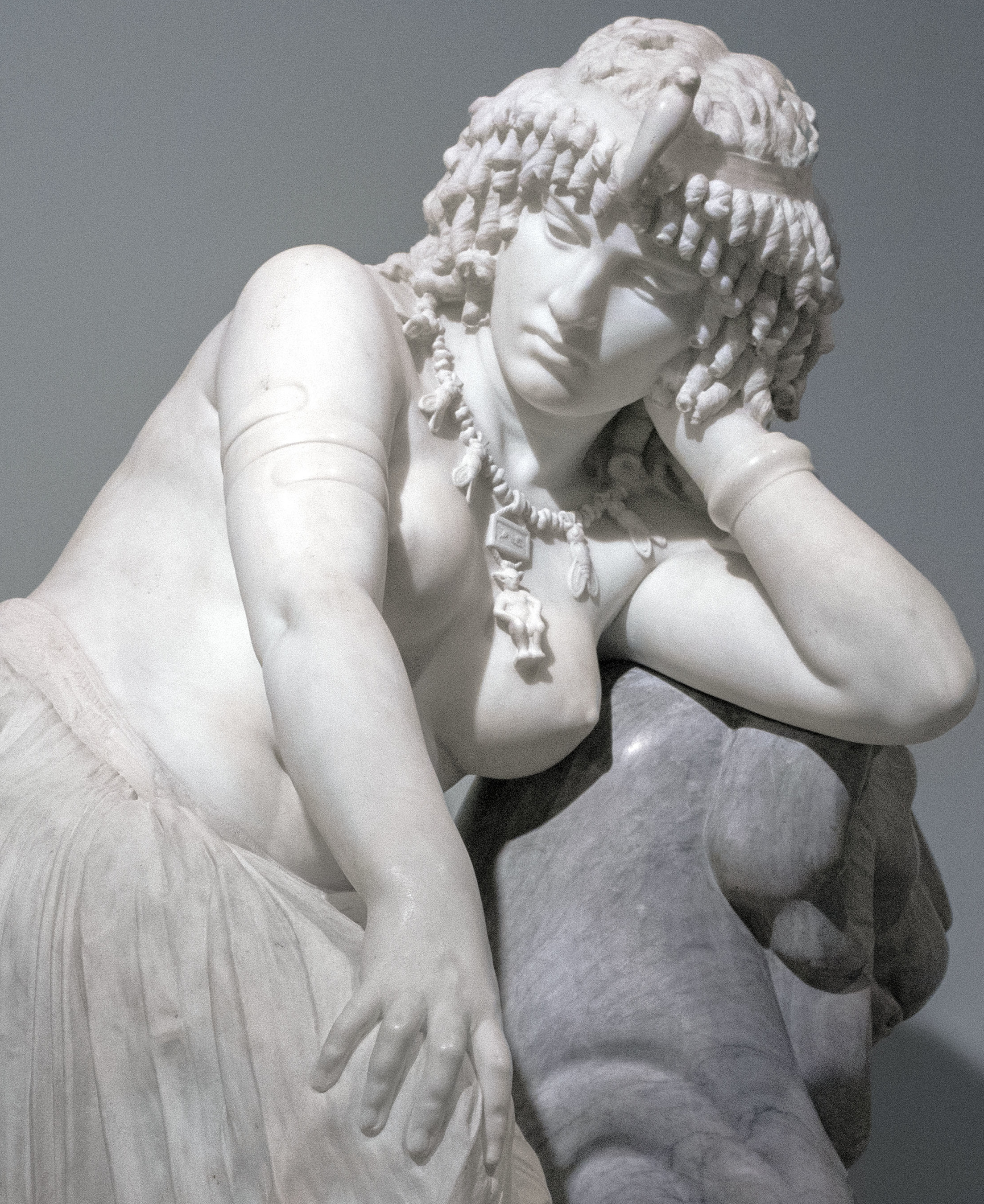 Escultura en mármol de Girolamo Masini realizada en 1882. Mide unos 130 cm de altura. Pertenece a la Galleria d’Arte Moderna di Roma Capitale, Roma. Se expuso en Arte Canal, Madrid, en "Cleopatra y la fascinación de Egipto". Descargable en alta resolución.